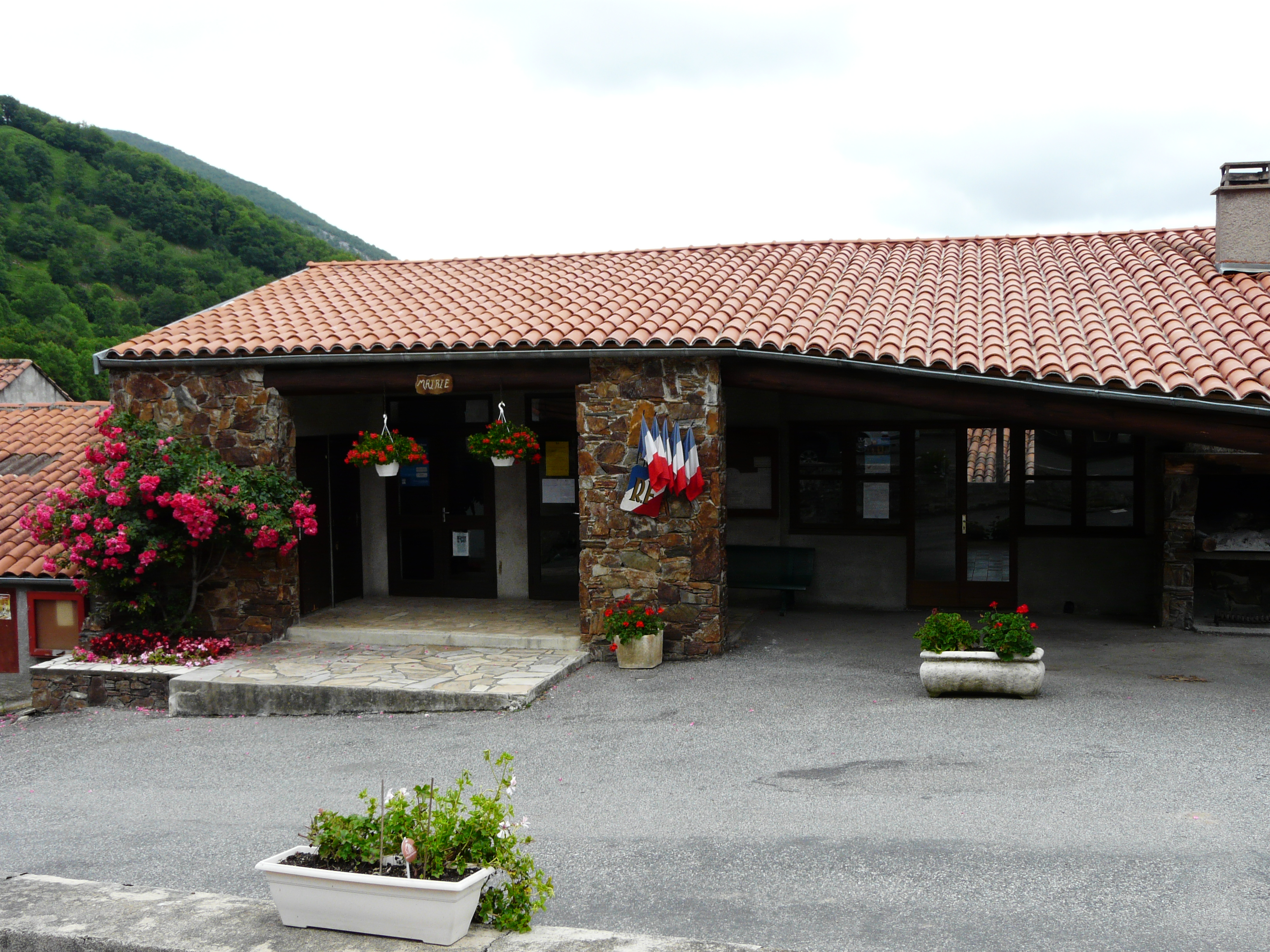 La mairie d'Esbareich, Hautes-Pyrénées, France.